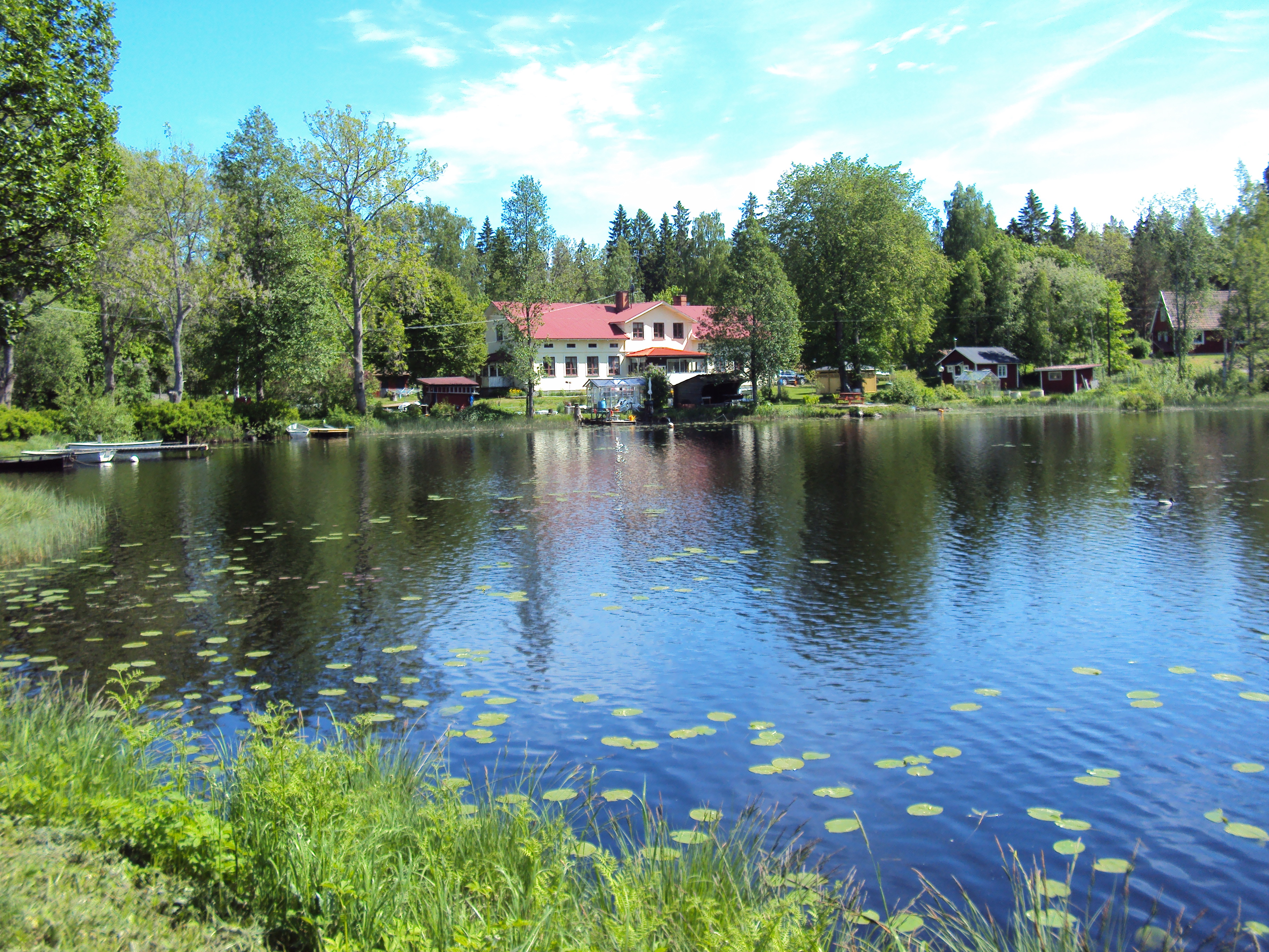 Sjö vid Gammelstilla bruk